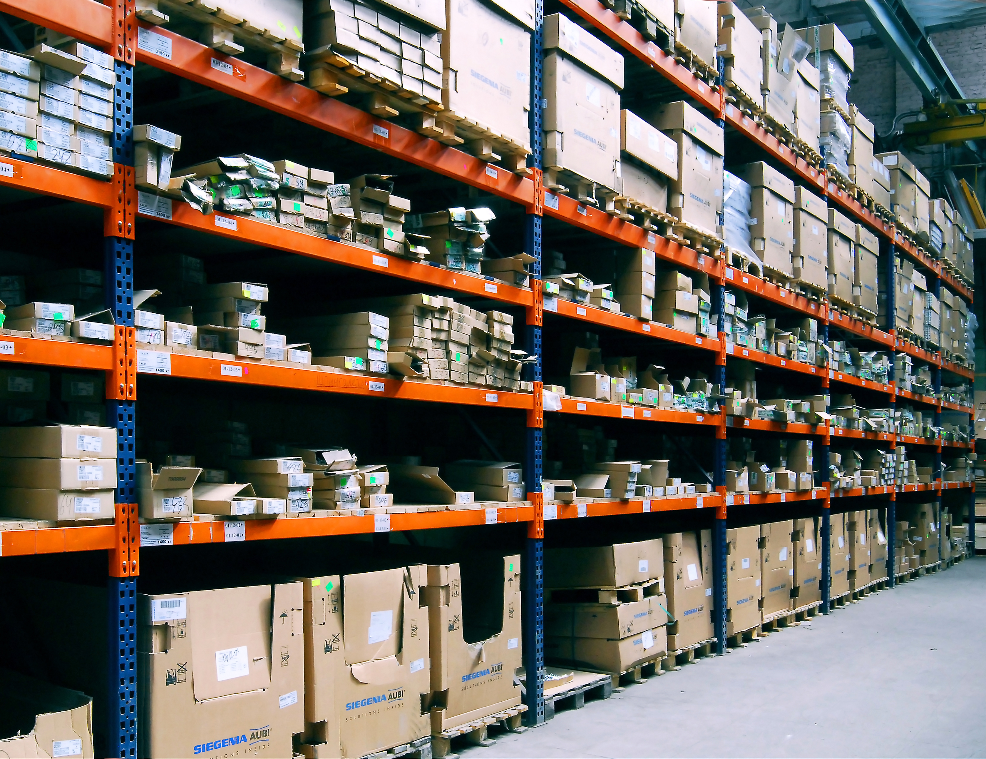 Фото паллетно-полочного стеллажа